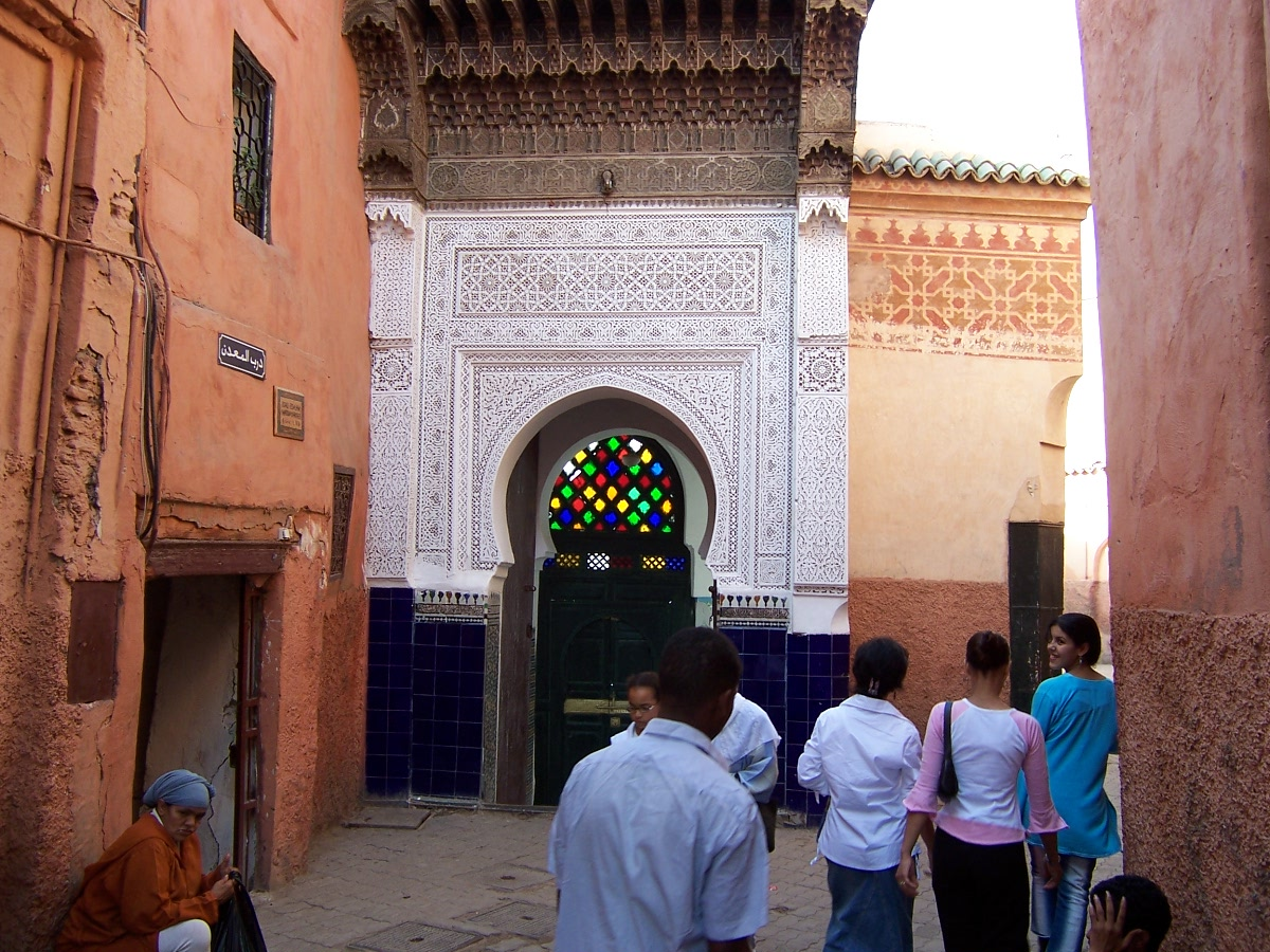 Fez, Morocco